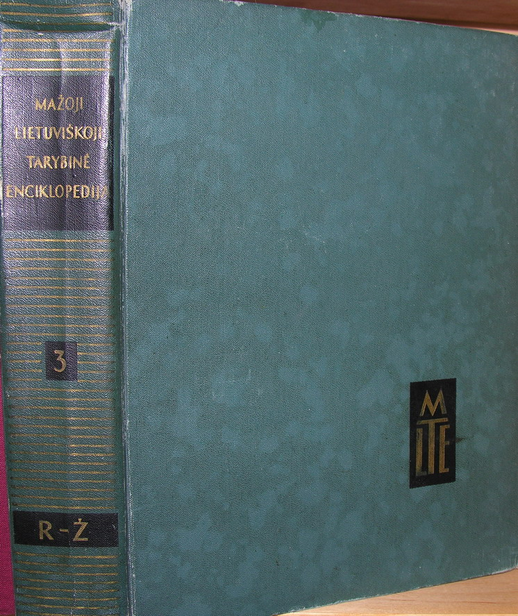 Mažoji lietuviškoji tarybinė enciklopedija Vilnius, 1966-1971, 1-3 t. Foto: Algirdas, 2006 m. balandžio 20 d.